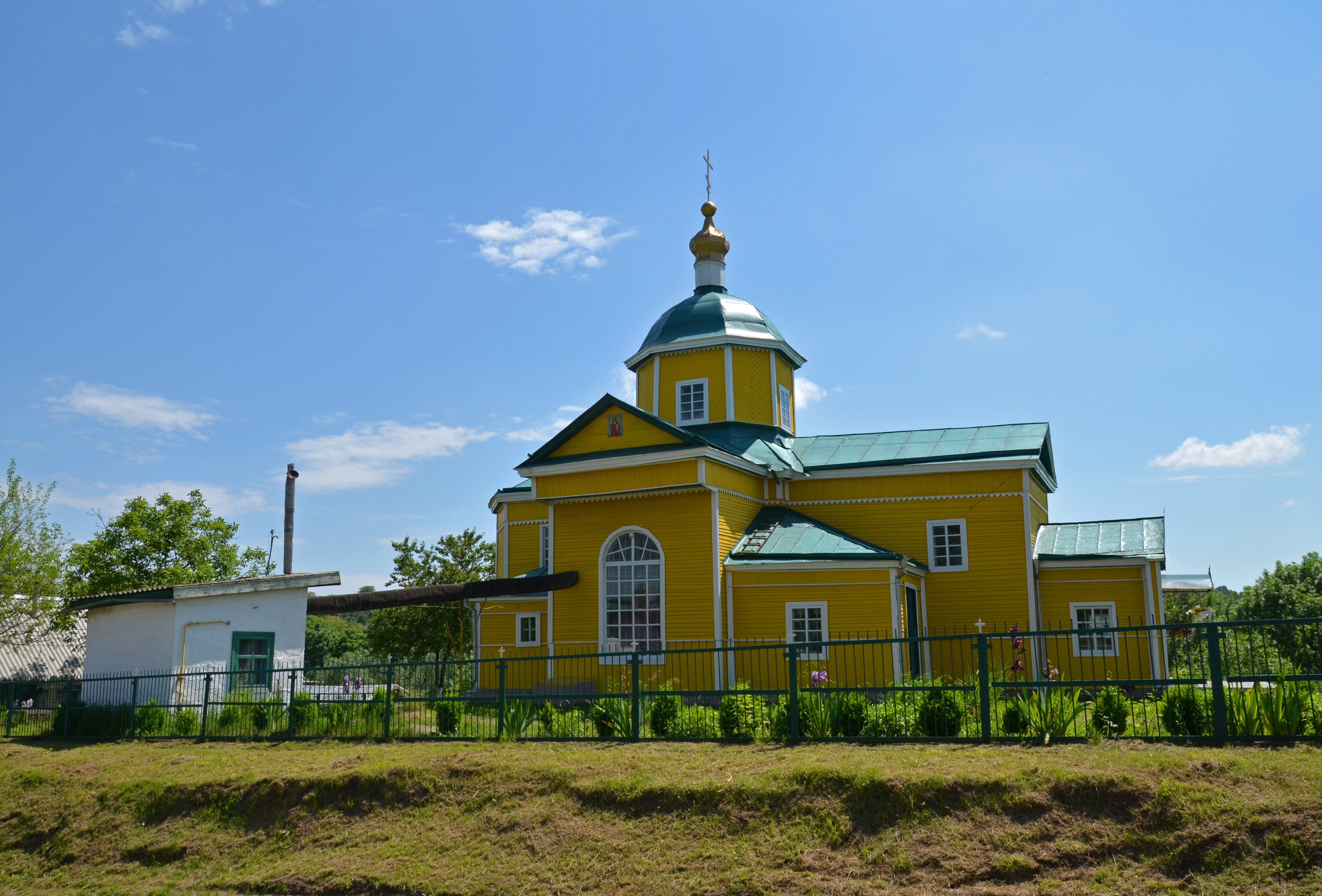 Святодухівська церква (дер.), село Шкарівка, біля будинку культури